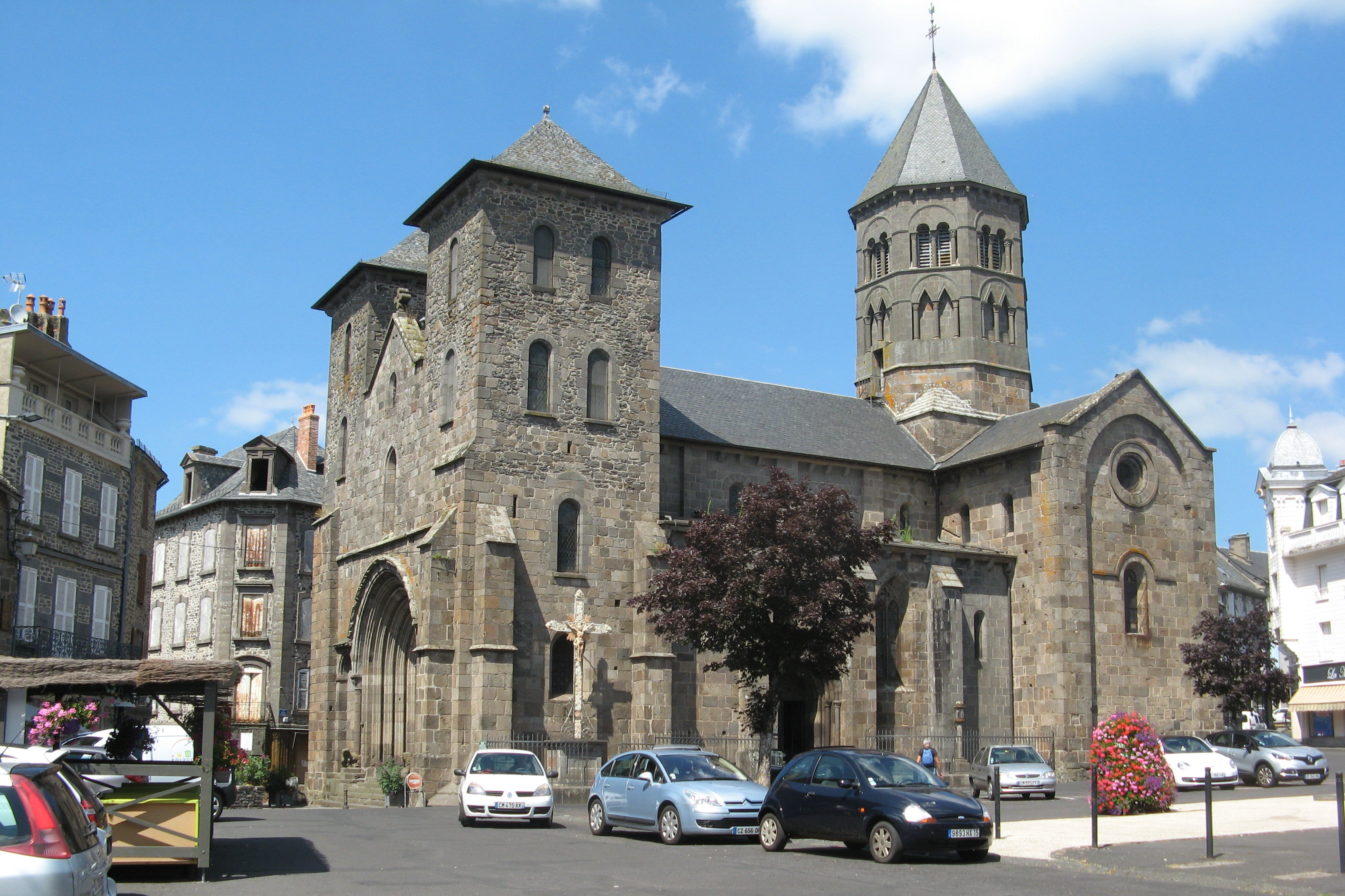 Mauriac, basilique ND-des-Miracles .